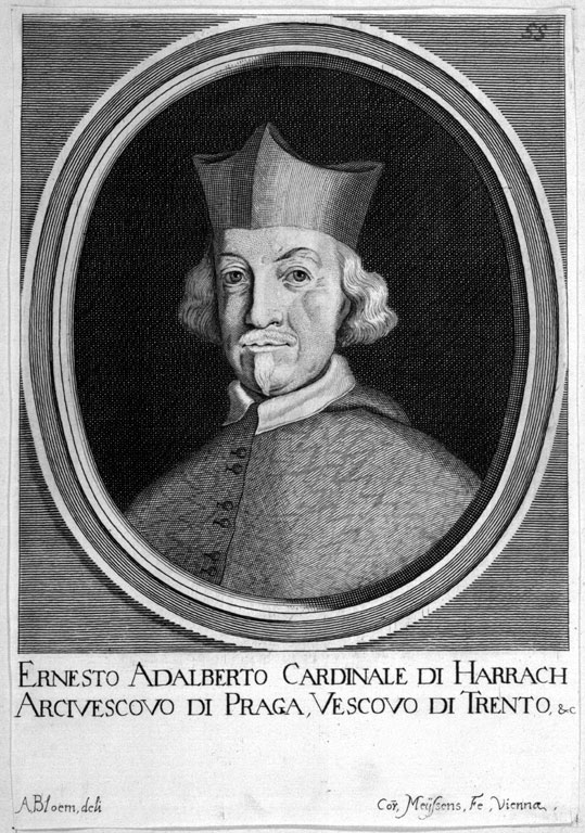 Der Adelige, Erzbischof von Prag, Bischof von Trient, Kardinal Ernst Adalbert von Harrach (tschechisch: Arnošt Vojtěch z Harrachu, 1598-1667)